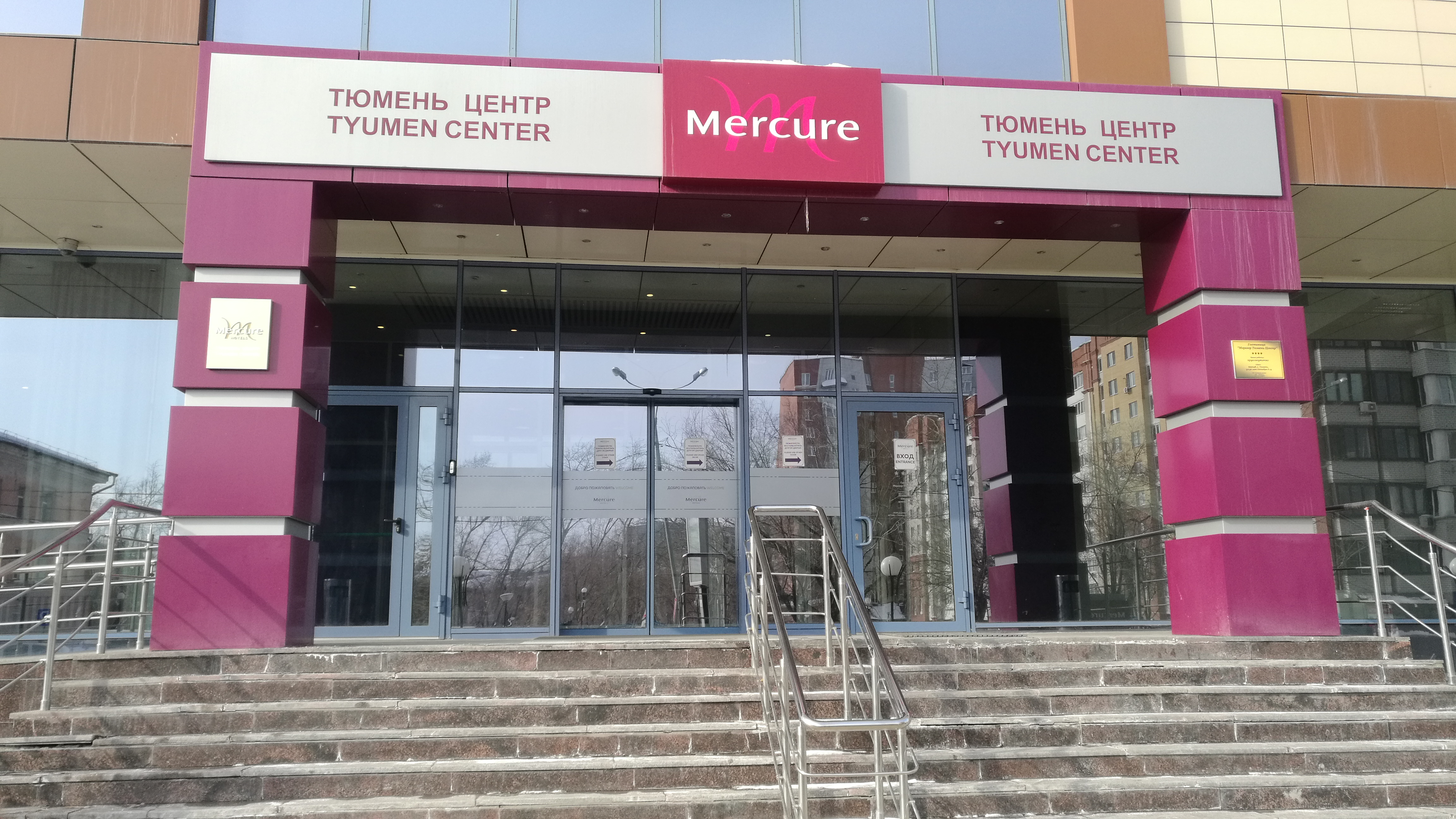 Hotelo Mercure. Tjumeno, Rusio.